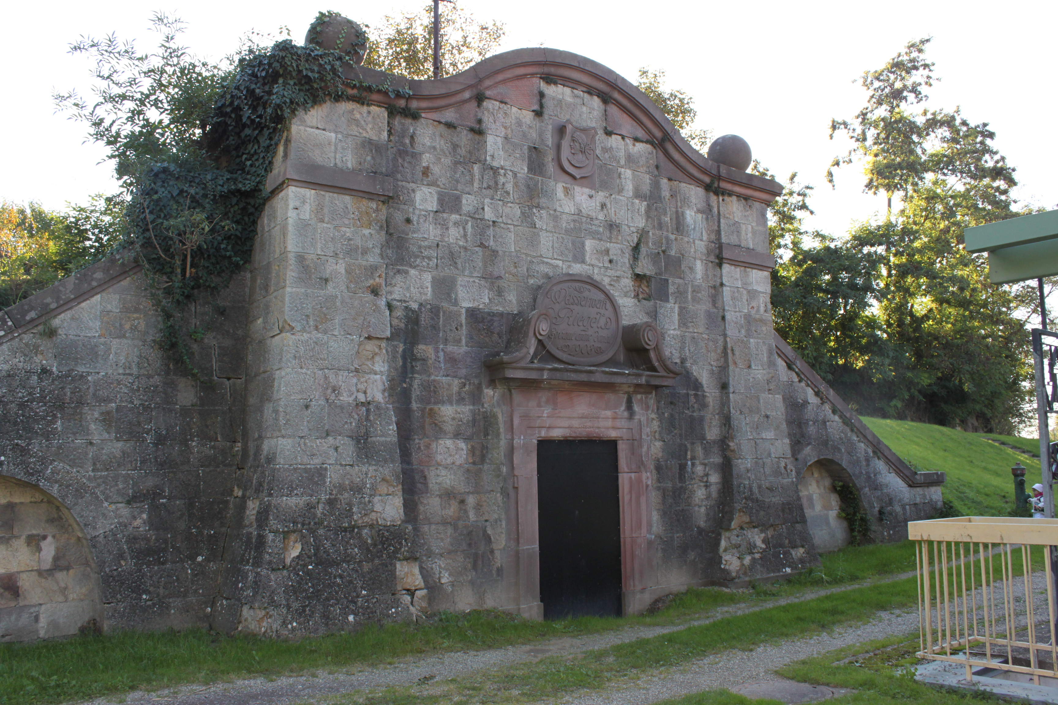 Alter Hochbehälter in Riegel am Kasierstuhl; oberhalb der Michaelsschule